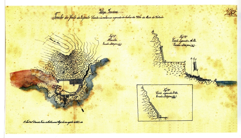 "Tombo do forte do Espírito Santo na extrema esquerda..." Ilha Terceira (Açores), Portugal.